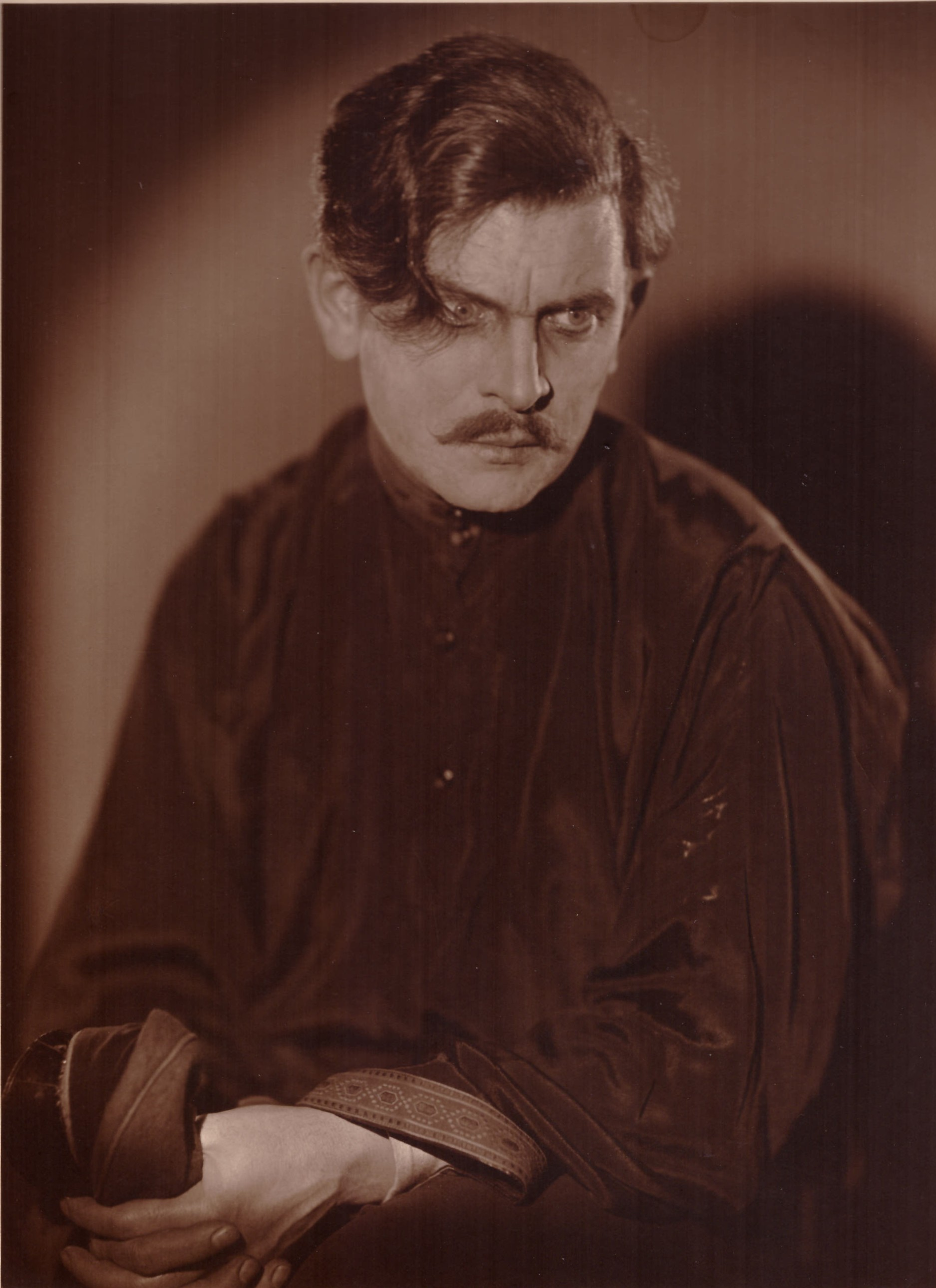 Upomínka zájezdu o Dostojevském - V roli Míti Karamazova ze hry F. M. Dostojevského: Bratři Karamazovi, režie Jan Bor, Divadlo na Vinohradech, premiéra 3. a 4. 3. 1931)